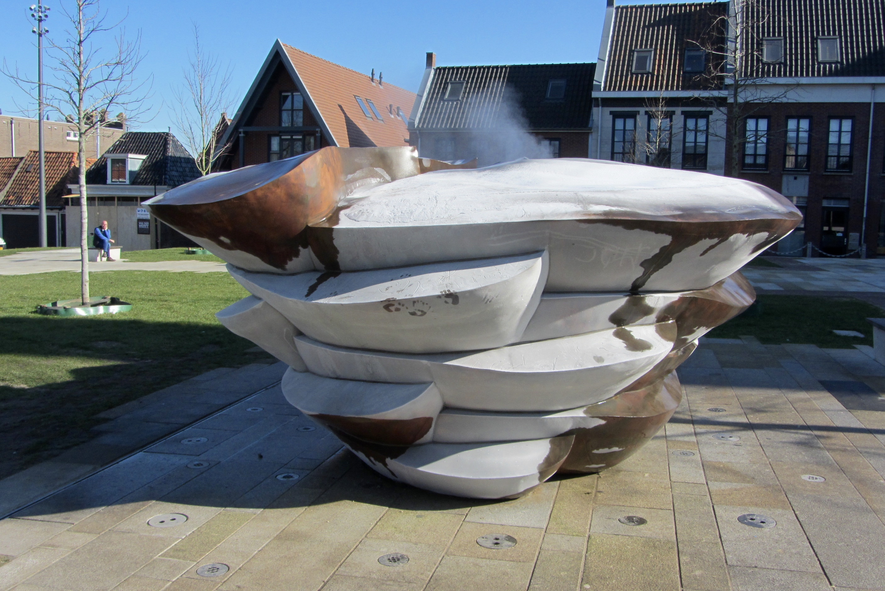 De vorm van de koperen fontein is zo gemaakt dat met de beschikbare energie een maximale hoeveelheid ijs kan worden gevormd. Miljoenen jaren aan evolutie in de plantenwereld hebben de basis gelegd voor deze Fibonacci vorm die voor optimale schaduwwerking zorgt. De IJsfontein is geen dag hetzelfde. IJsbloemen, -baarden en –patronen worden het ene moment gevormd om het volgende moment weer te verdwijnen. Afhankelijk van de stand van de zon, de luchtvochtigheid, de temperatuur, wind en neerslag. De fontein is speelbal van de natuurlijke elementen. De energie voor de fontein wordt via zonnepanelen opgewekt. De fontein wordt omringd door bomen die rood kleuren in het najaar. De bomen verwijzen naar de martelaren van Bonifatius, die op zijn zendelingstocht bij Dokkum om het leven is gebracht. In het kader van de Culturele Hoofdstad 2018 zijn in de elf steden van Fryslân fonteinen geplaatst. Ontworpen door elf kunstenaars van internationale faam.